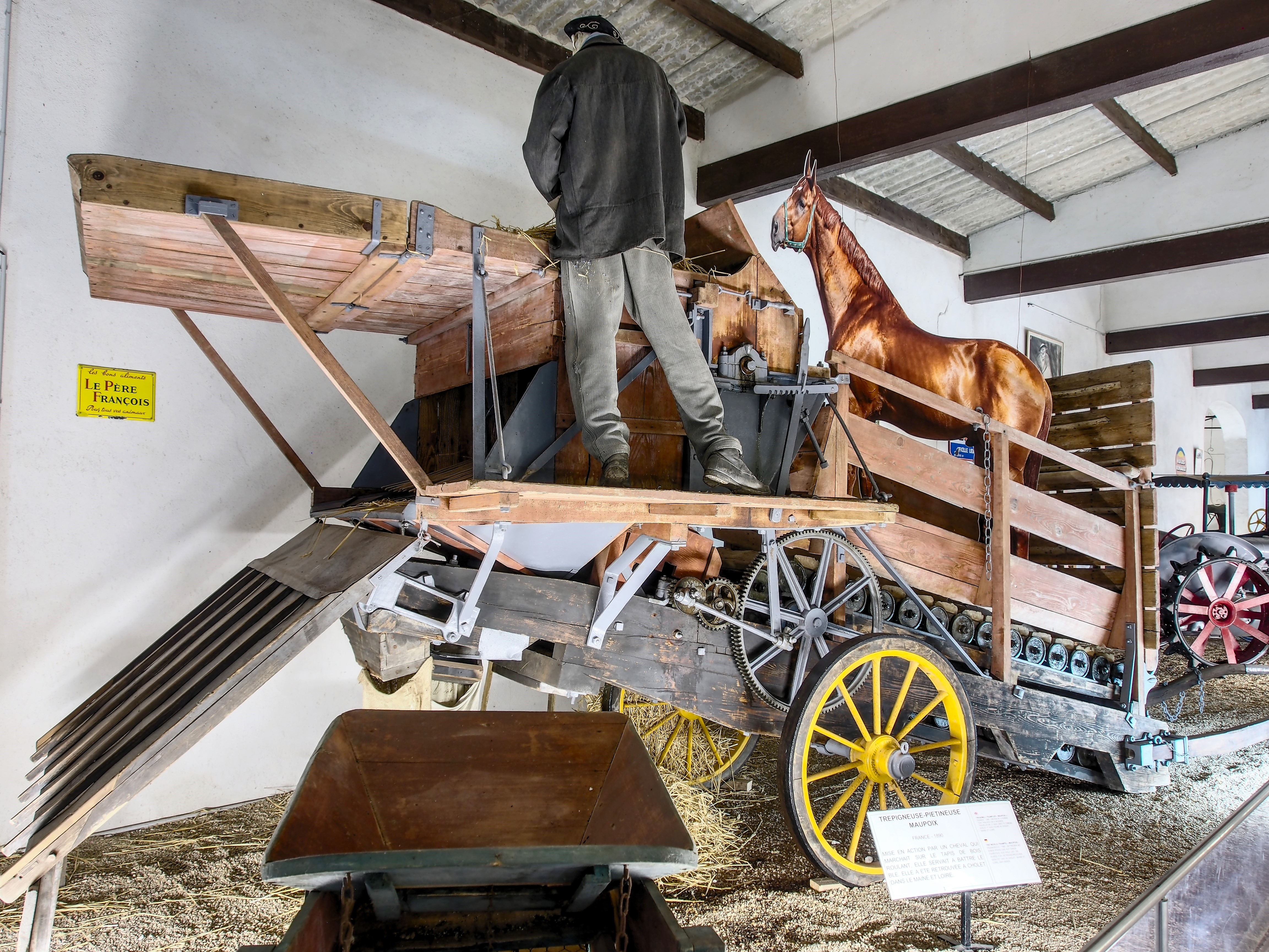 Photographed at Musée Maurice Dufresne, Azay-le-Rideau, France.